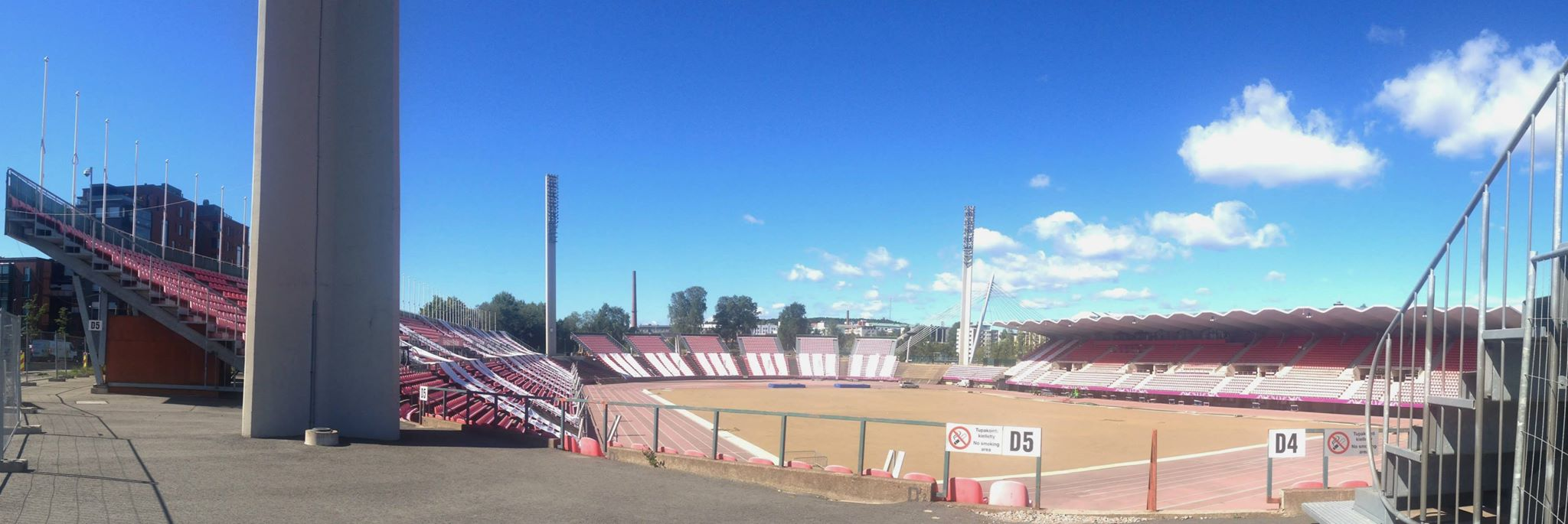 Tampereen stadion 14. elokuuta 2015